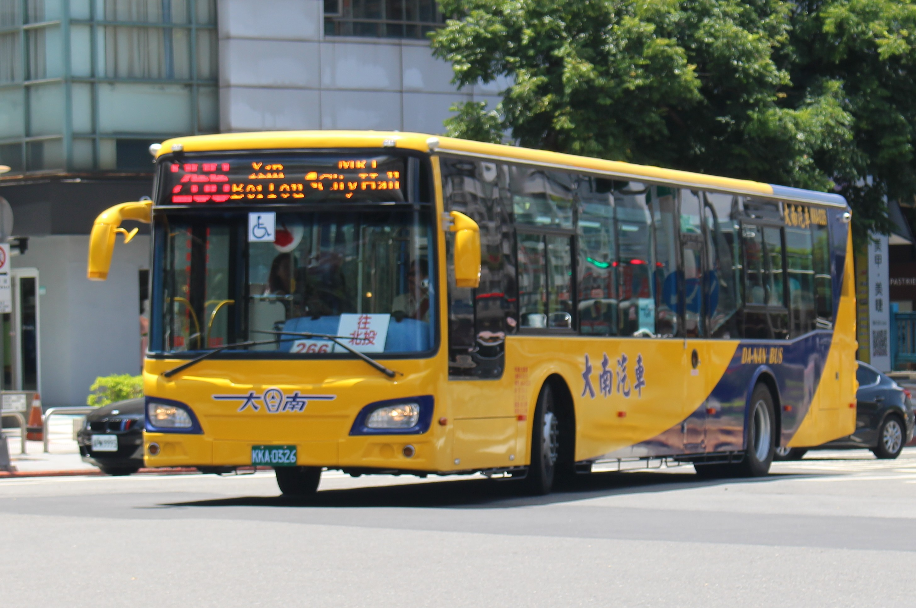 大南汽車 2017 HINO HS8JRVL-UTF KKA-0326